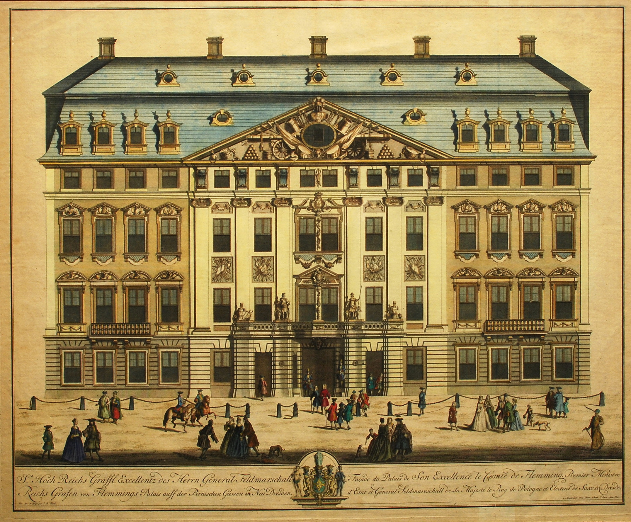 Stadt-Palais von Jacob Heinrich Reichsgraf von Flemming (* 3. März 1667, † 30. April 1728) in Dresden (Germany/Sachsen). Erbaut 1715 von Johann Rudolph Fäsch († 1. November 1749 in Dresden) als sog. Holländisches Palais. Umgebaut 1717 zum Japanischen Palais. Aquarellierter Kupferstich 49 x 59 cm.